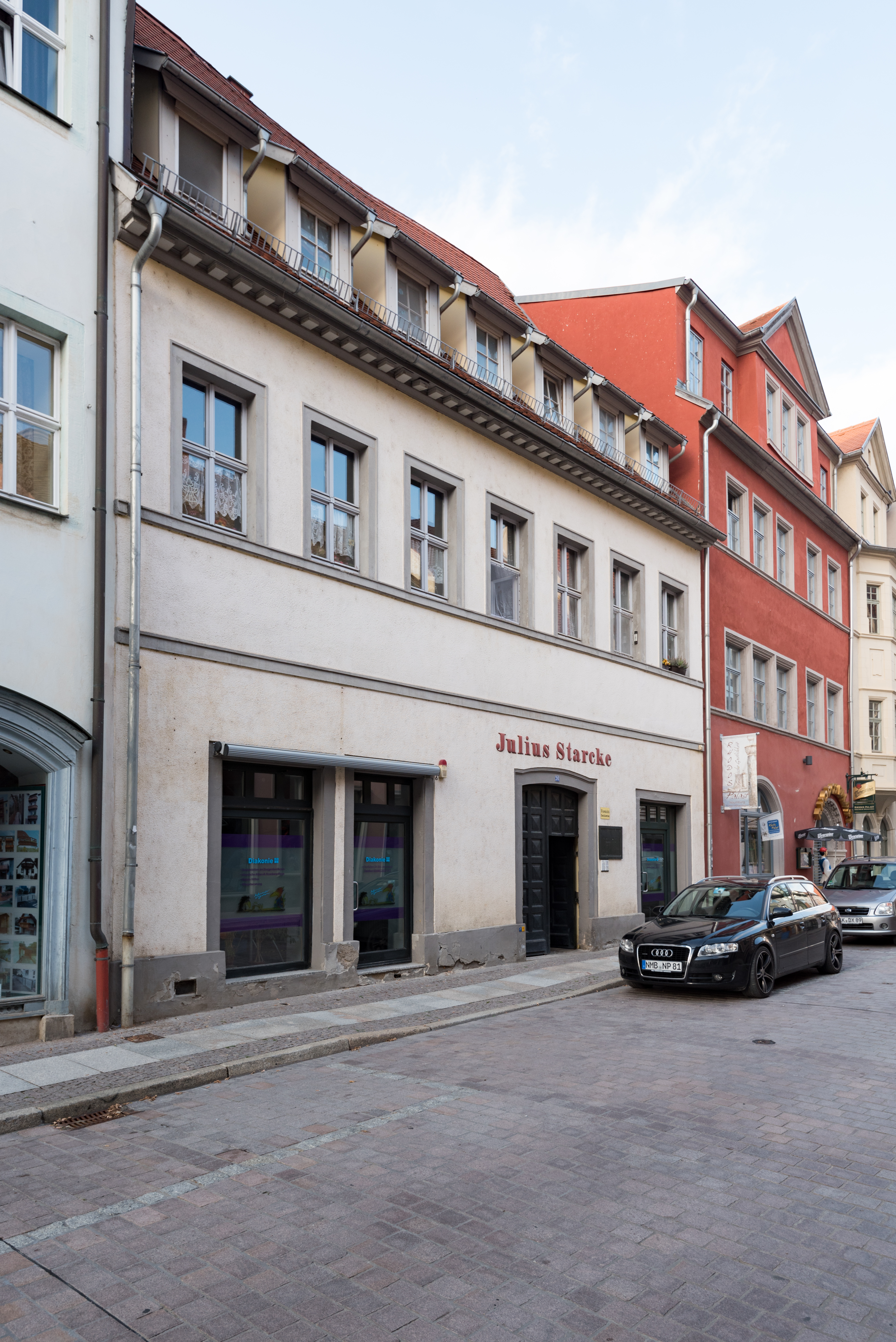 Naumburg (Saale), Marienstraße 36